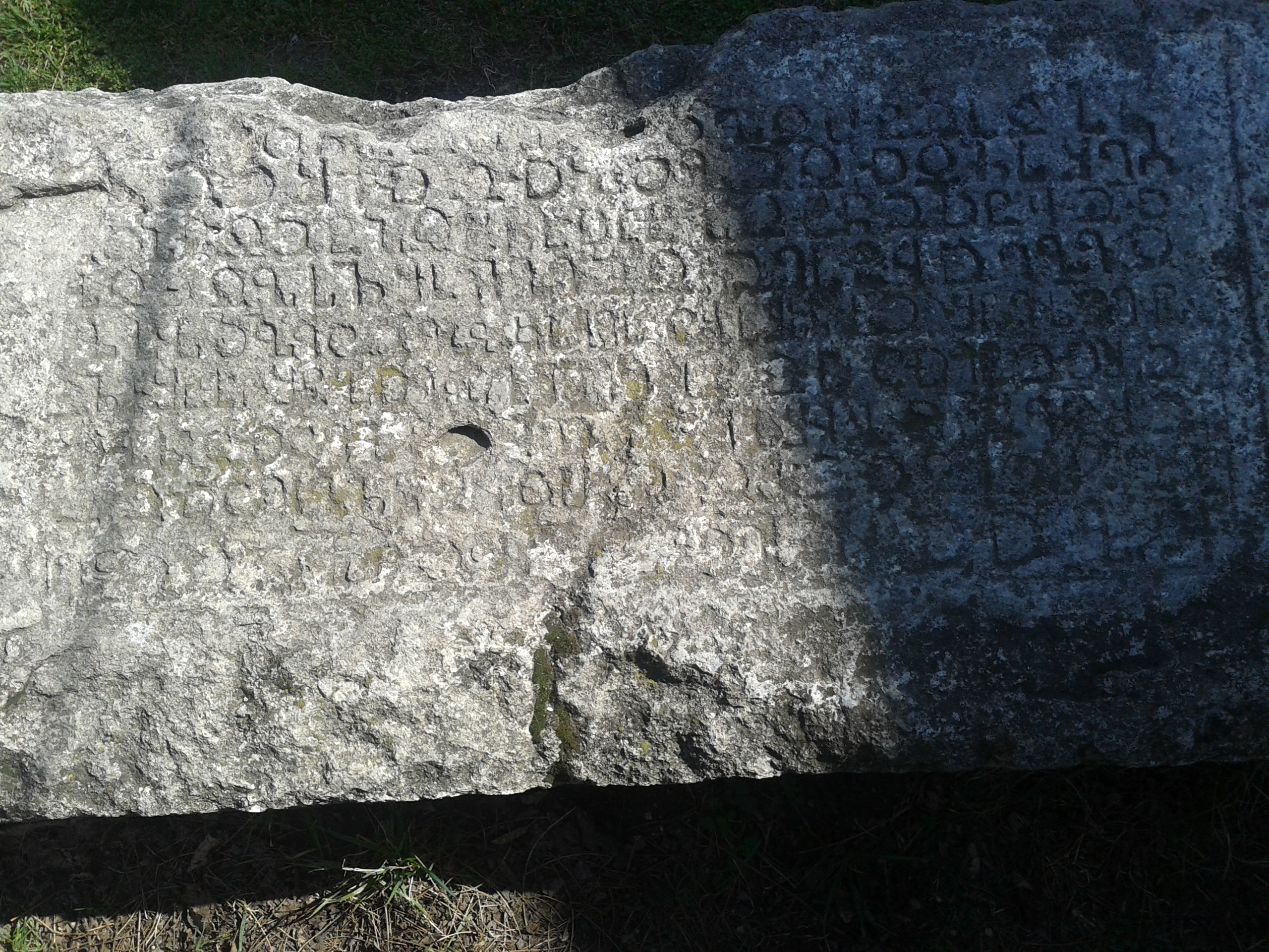 სურამის ღვთაების ეკლესიის წარწერა